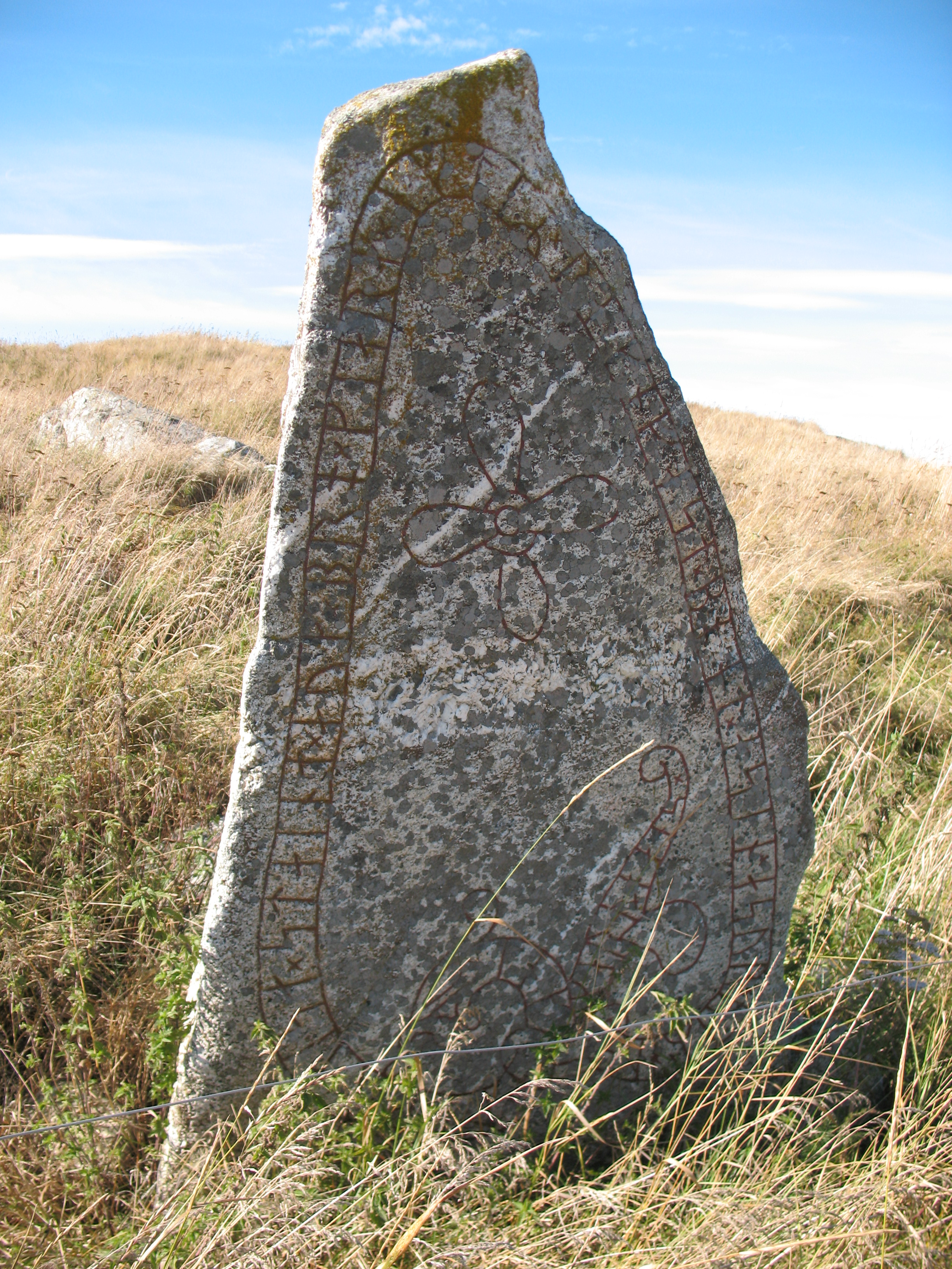 Runstenen U 330 i Snåttsta, Markims socken, Vallentuna kommun.